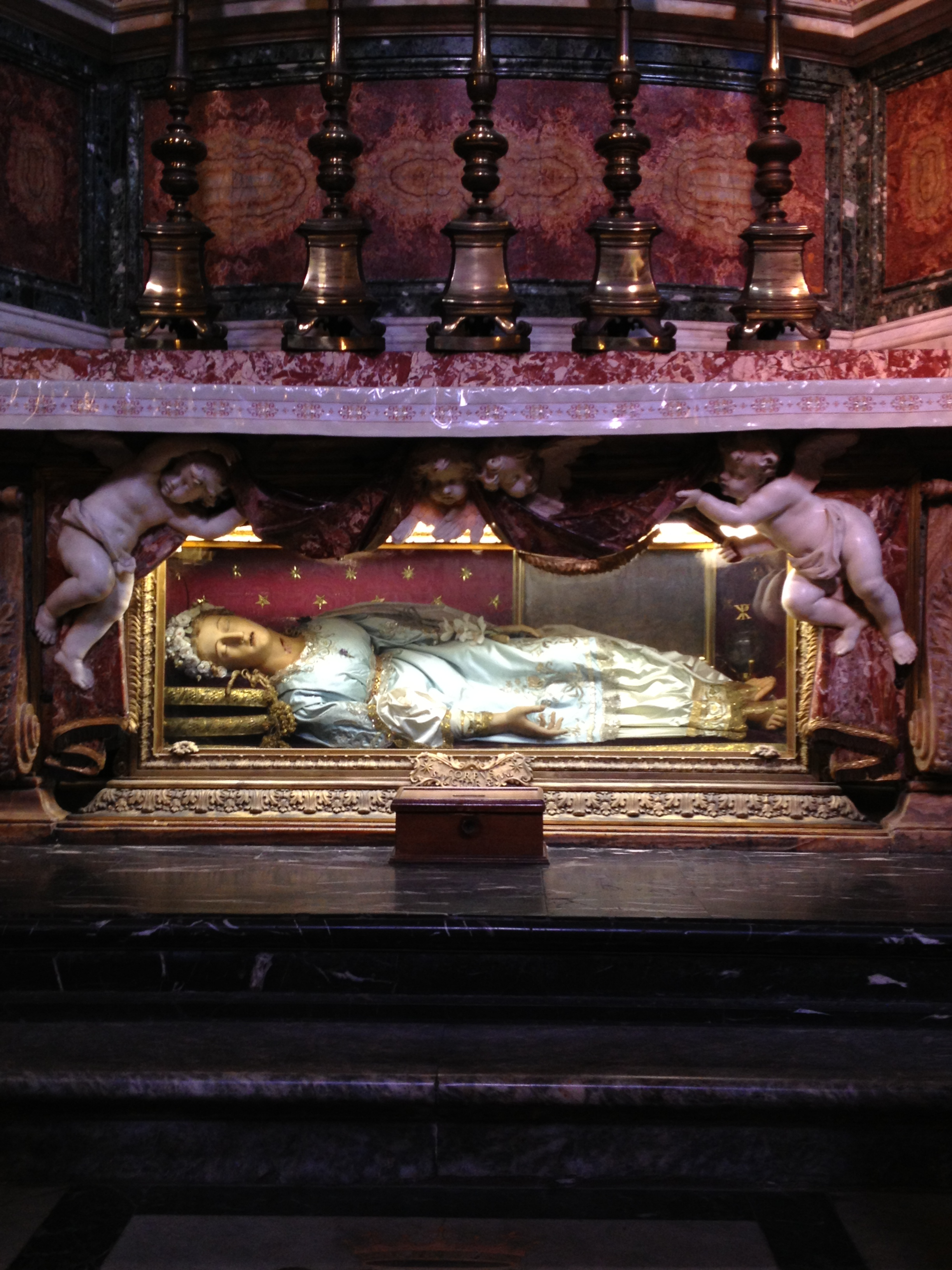 Chiesa di Santa Maria della Vittoria a Roma - altare laterale